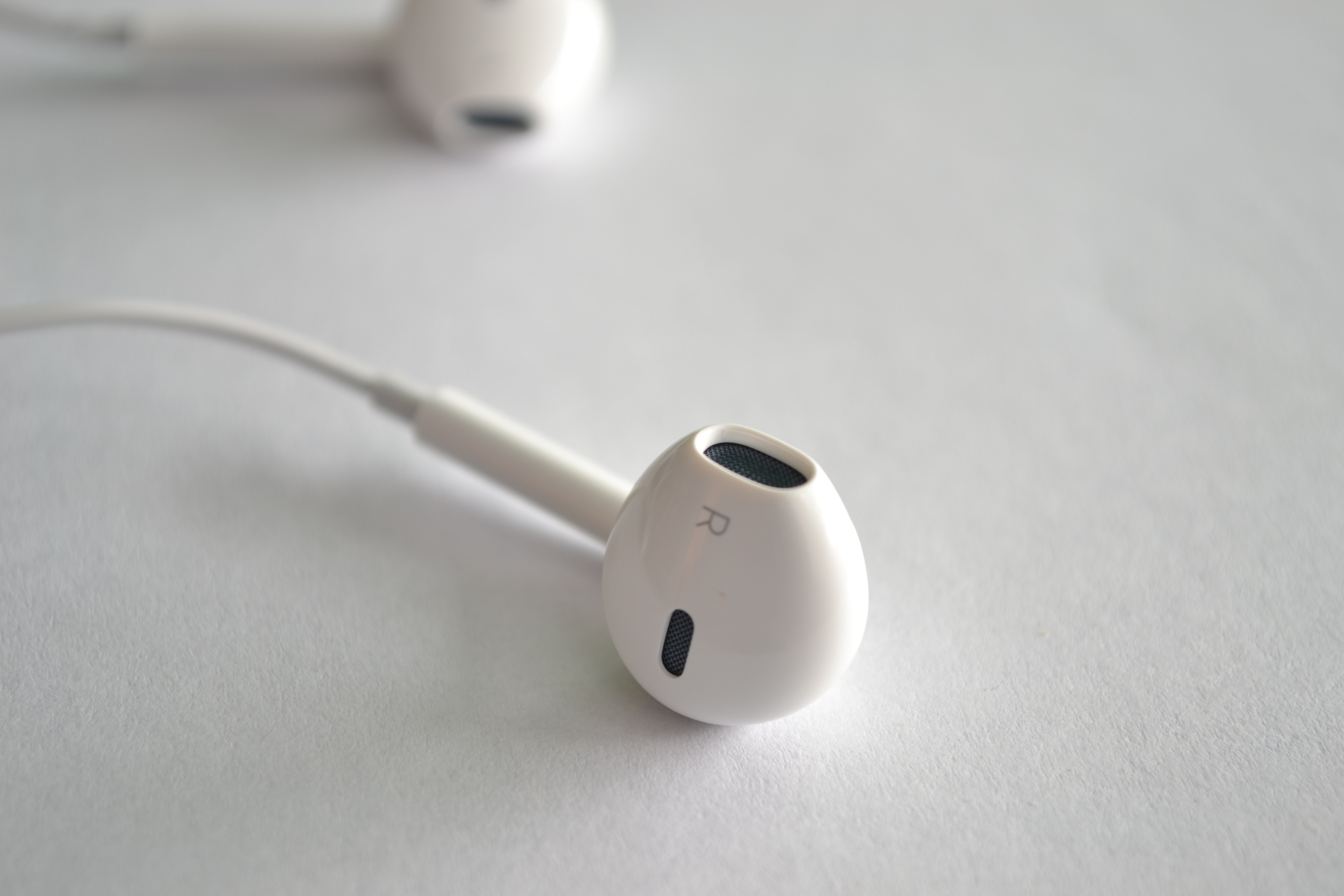 Auricular EarPod derecho